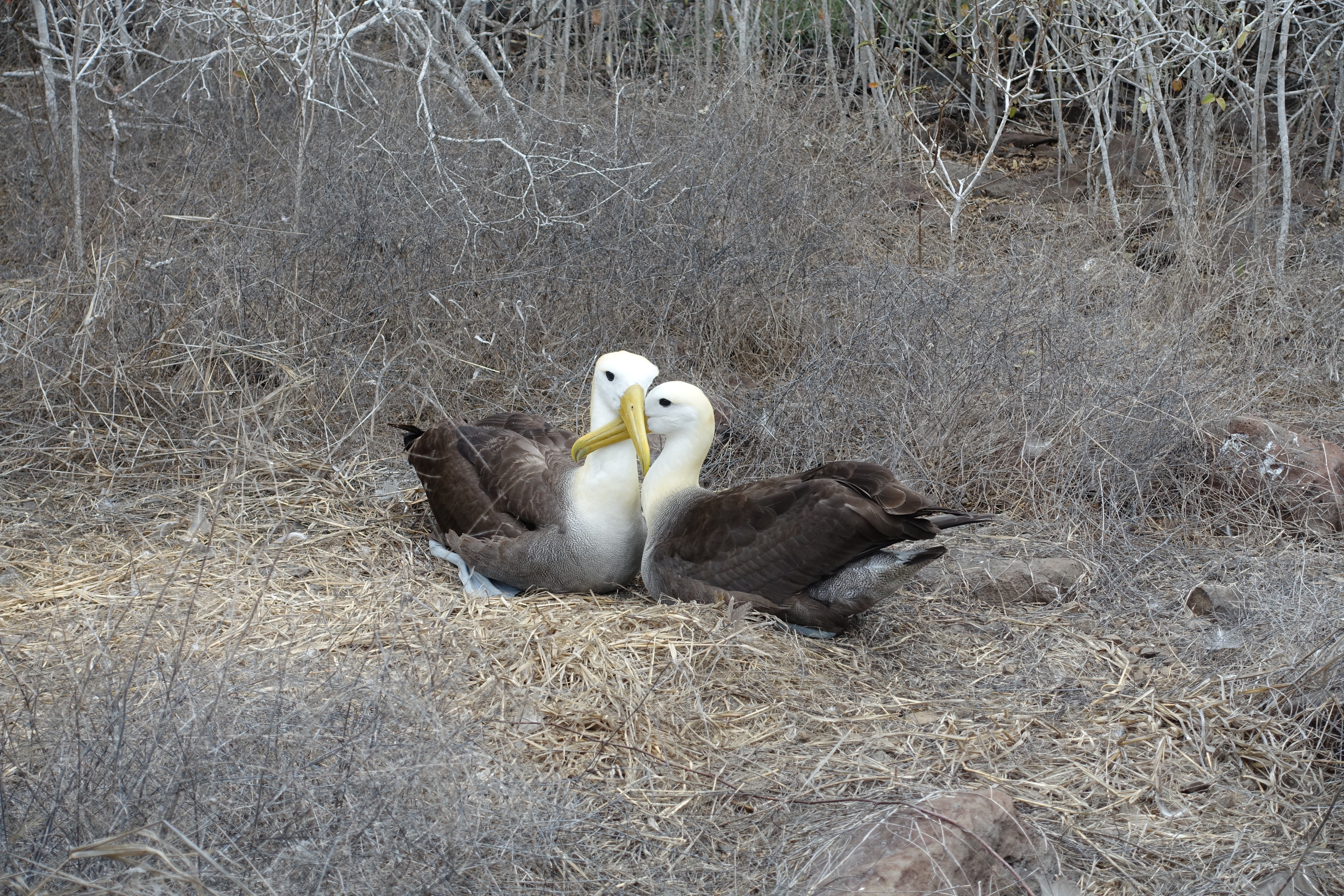 Twee albatrossen op Galapagos, galapagosalbatros (Phoebastria irrorata)